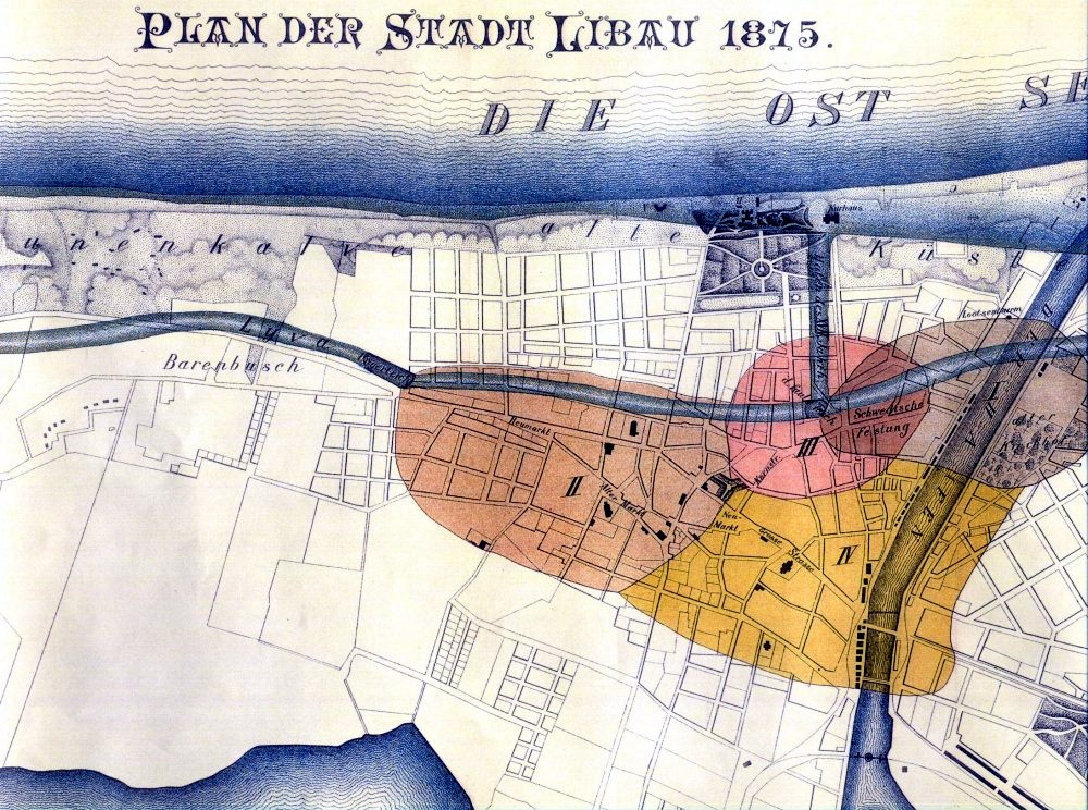 Old Libau German color map (1875)